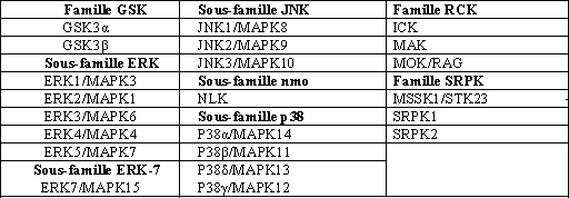 Tableau des différents membres de la famille des MAP kinases